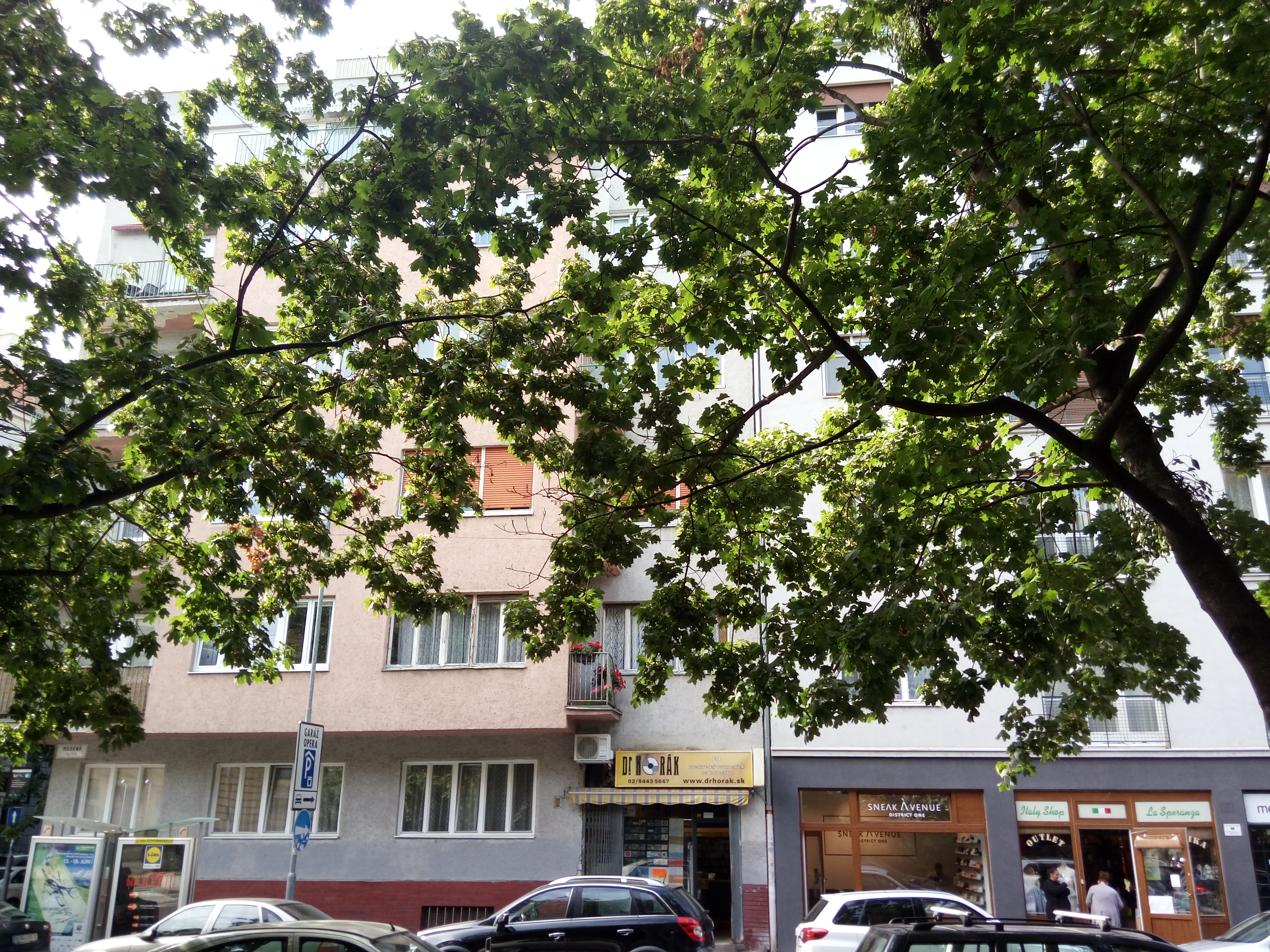 Medená, Staré Mesto, Bratislava